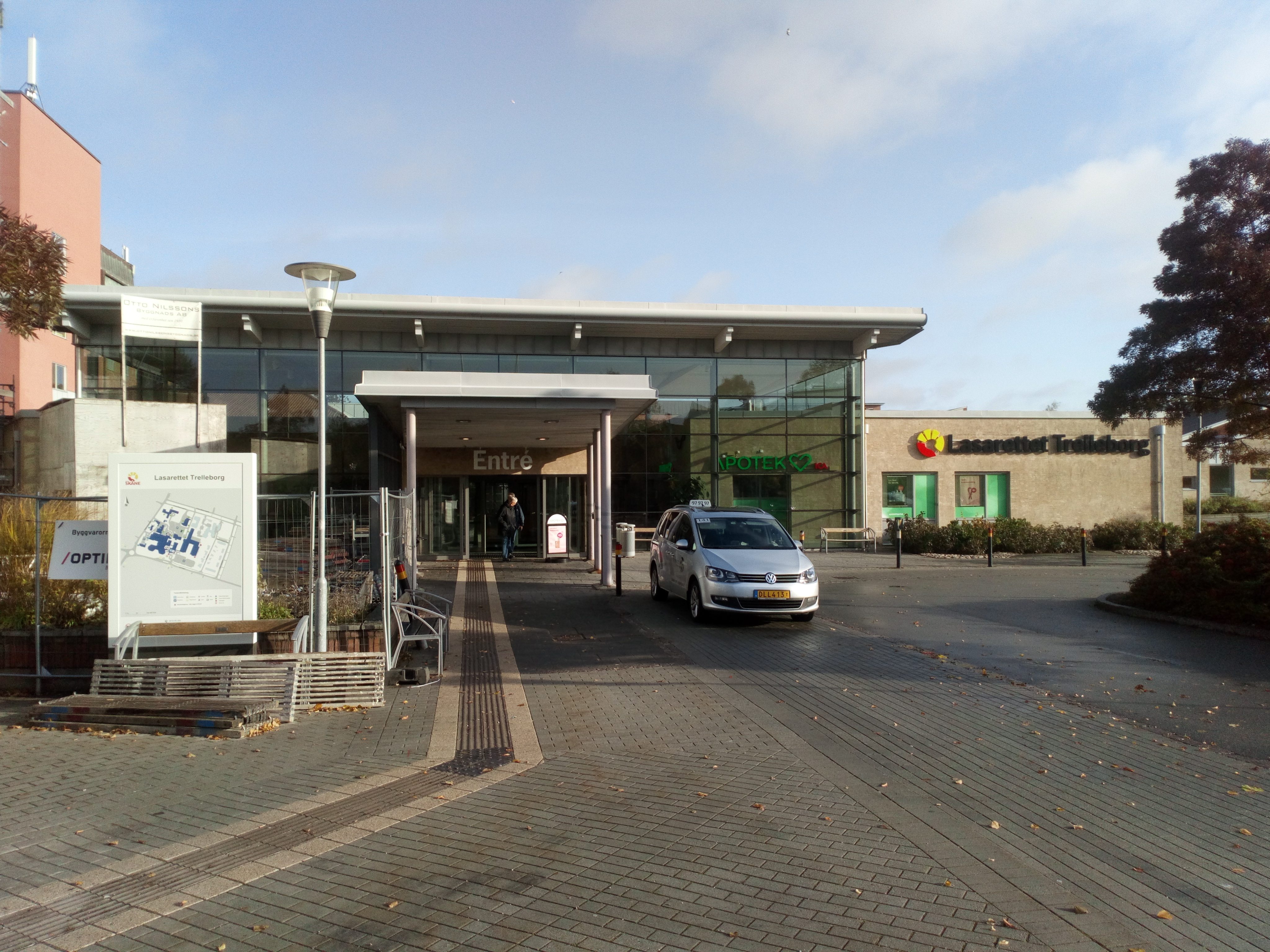 Huvudentré, Lasarettet Trelleborg